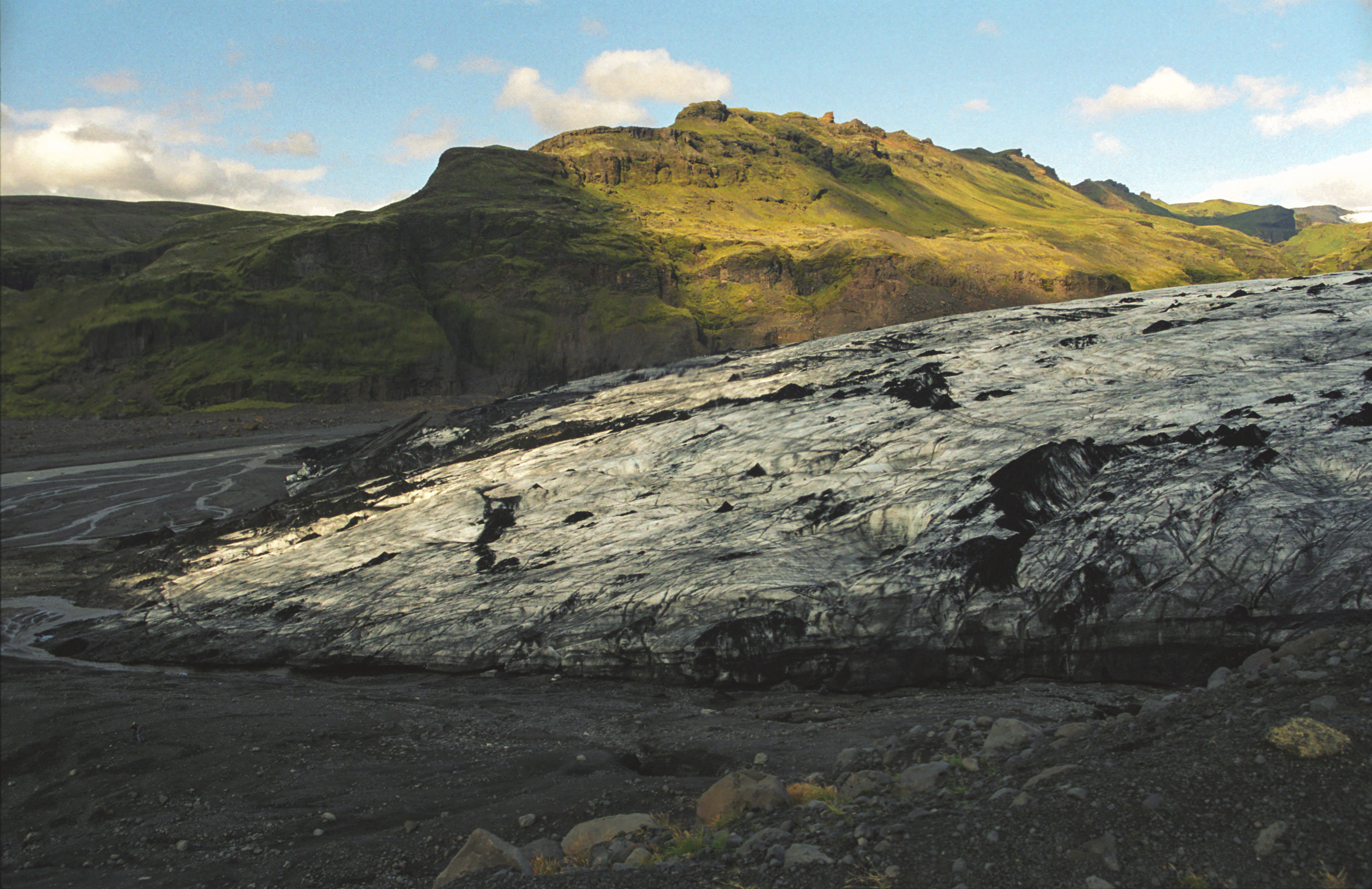 Sólheimajökull - południowo-zachodni język lodowca Myrdalsjokull